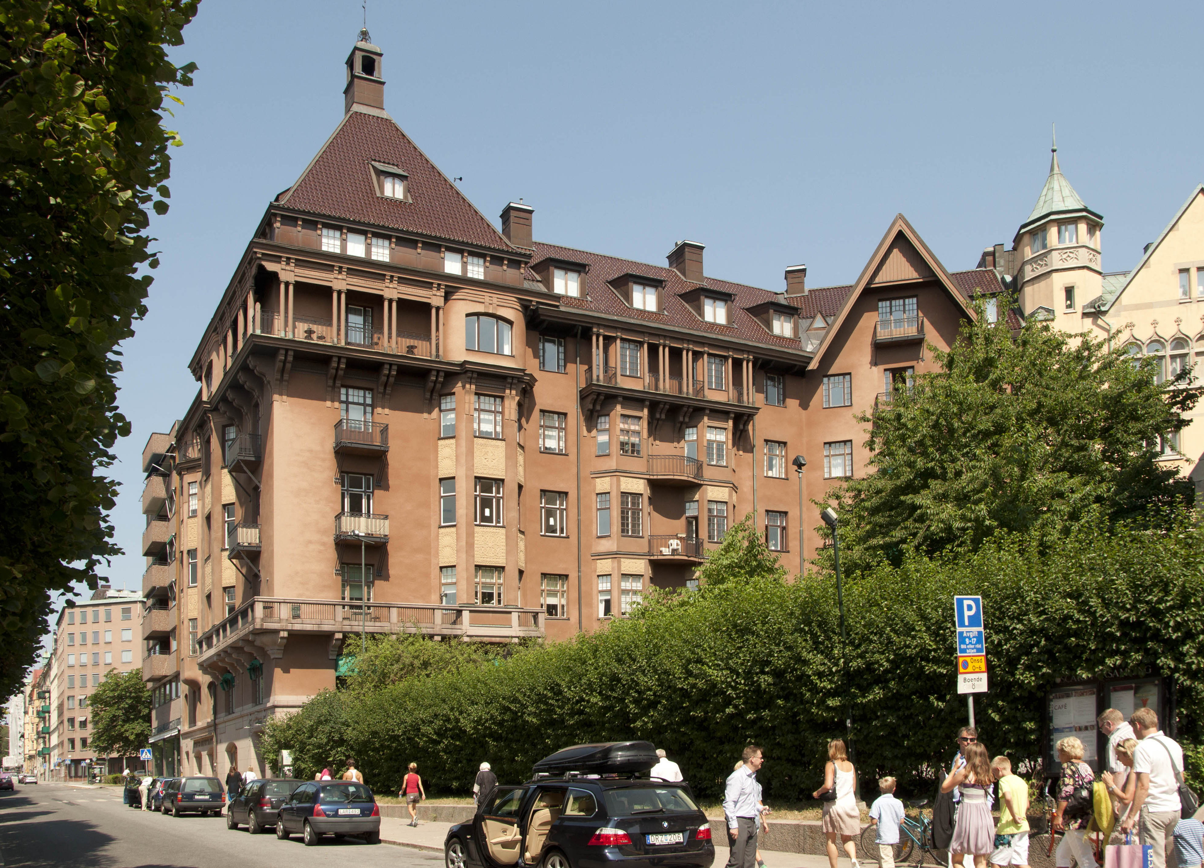 Narvavägen 8, Stockholm. Byggt 1903-1906.